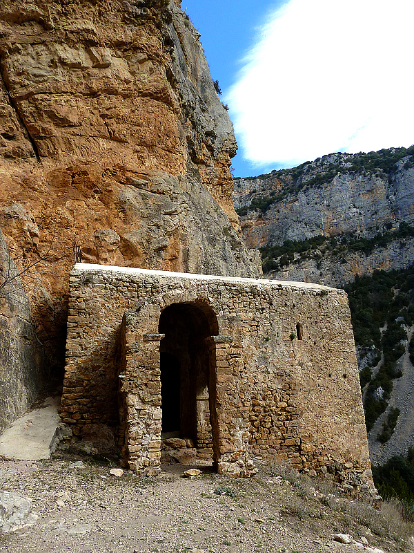 Aragonés: Ermita de Sant Martín de Morrano